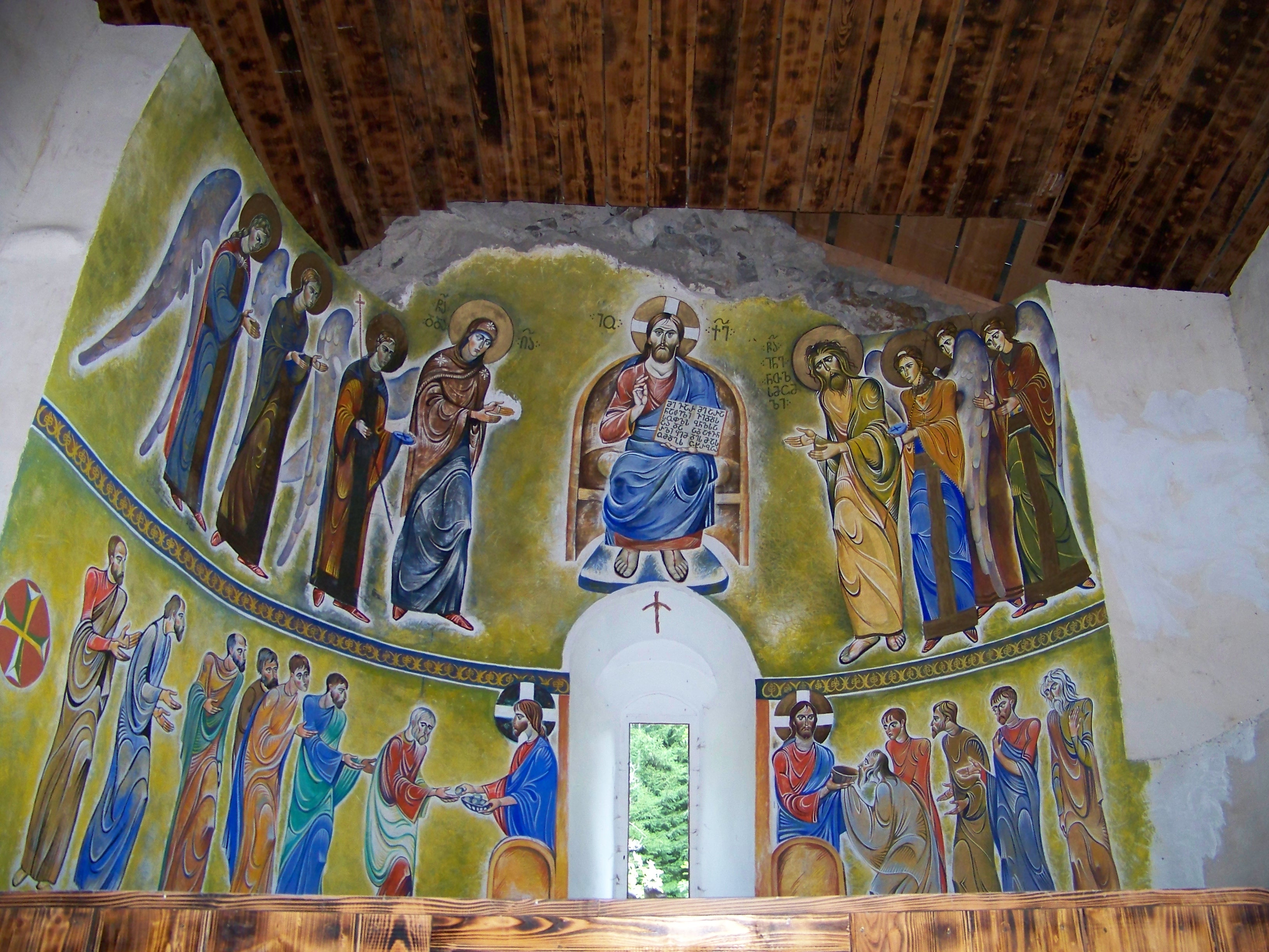 წმ. გიორგის ეკლესია